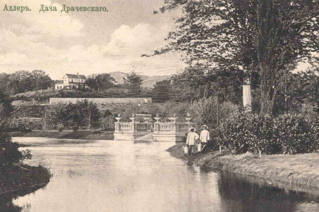 Бывшая дача генерала Драчевского в Адлере. В настоящее время территория парка Южные культуры.